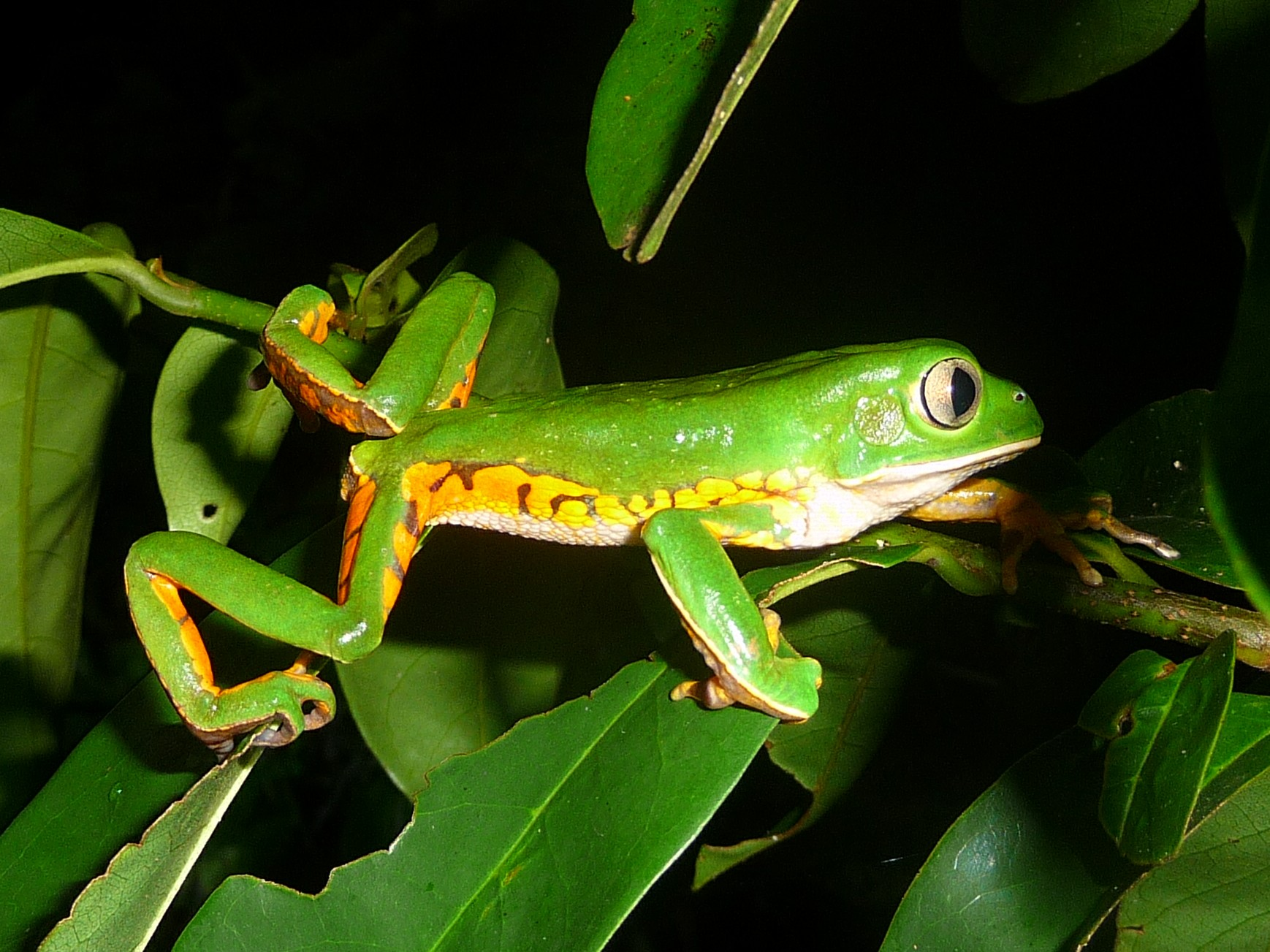 Animal fotografado em saída a campo para a Estação Ecológica de Águas de Santa Bárbara